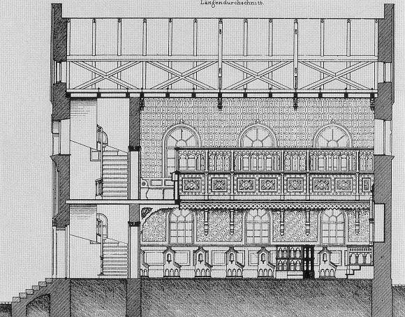 Ehemalige Synagoge in Heidenheim (Mittelfranken), Längsschnitt